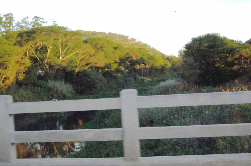 Аутор Р.Корда, Зимбабве 2005